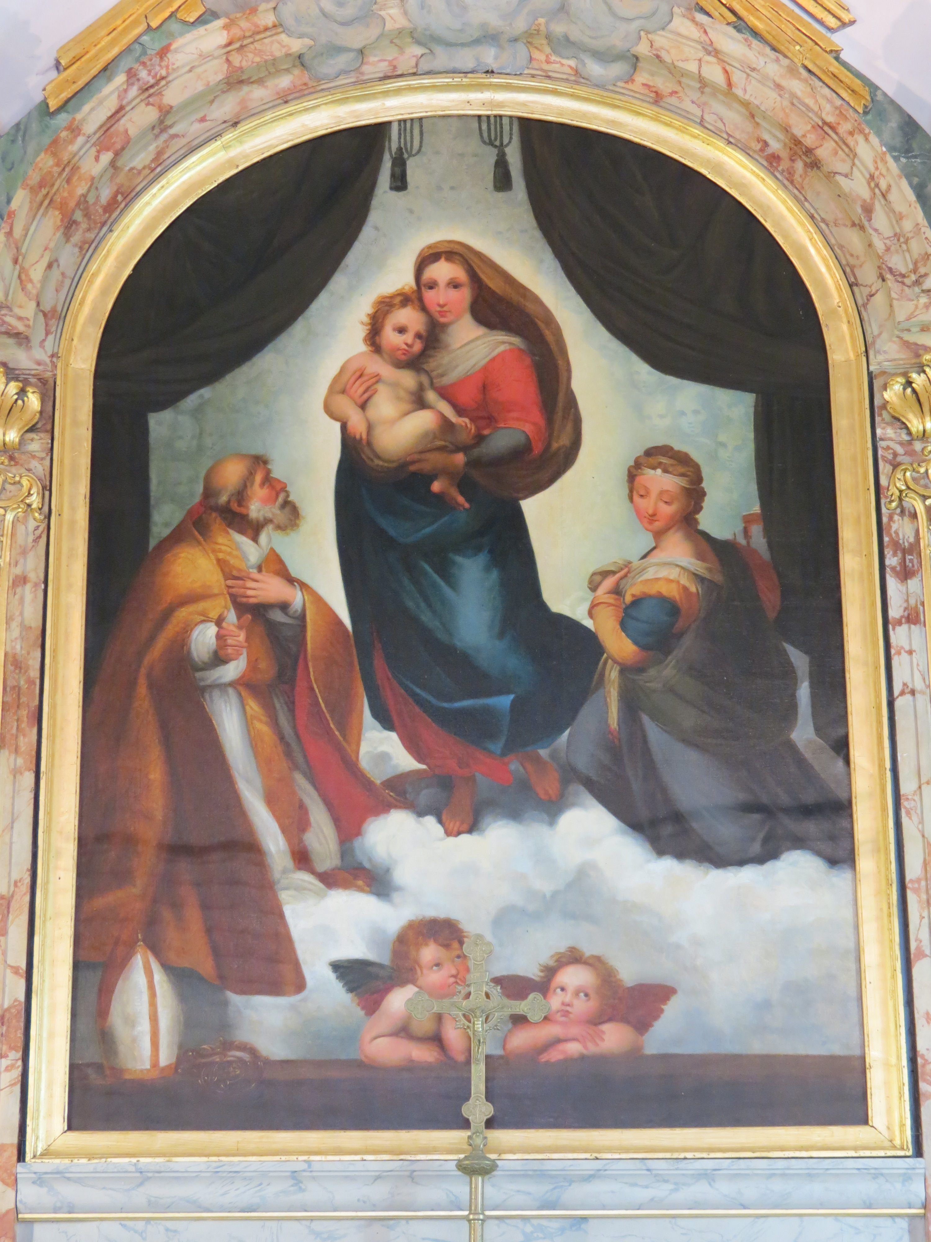 Église Notre-Dame de Belbeuf.